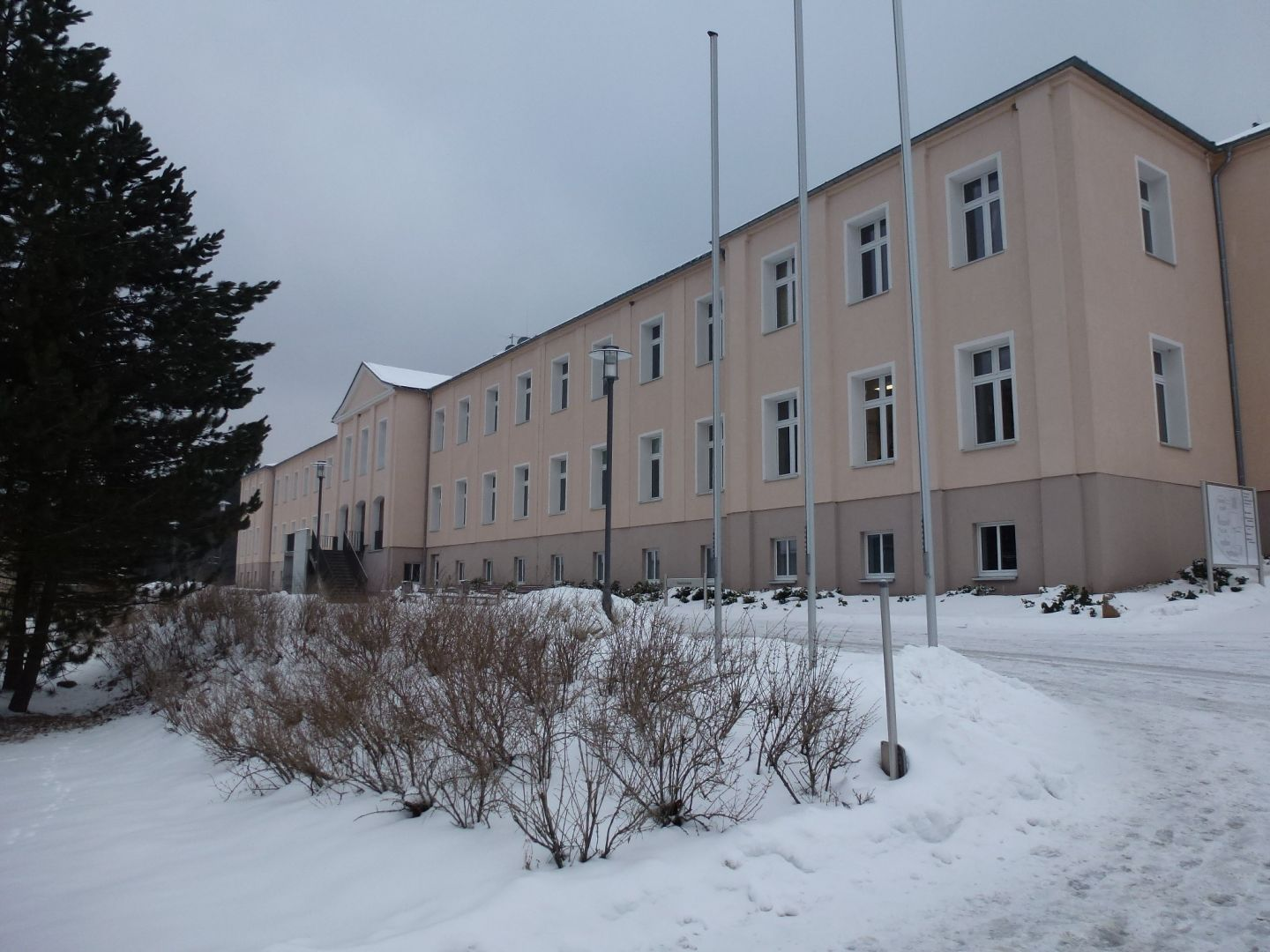 Hauptgebäude der Staatlichen Studienakademie Breitenbrunn